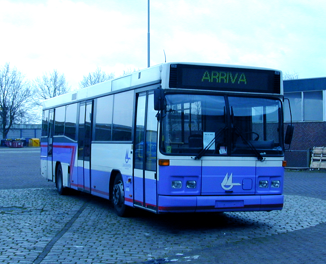 Ödåkra Buss AB, Helsingborg bus 6406 als Länstrafiken Malmöhus en later als Arriva bus 5904 van het type Volvo B10BLE - Carrus City L te Groningen. Deze bus is sinds juli 2010 als Arriva Portugal.